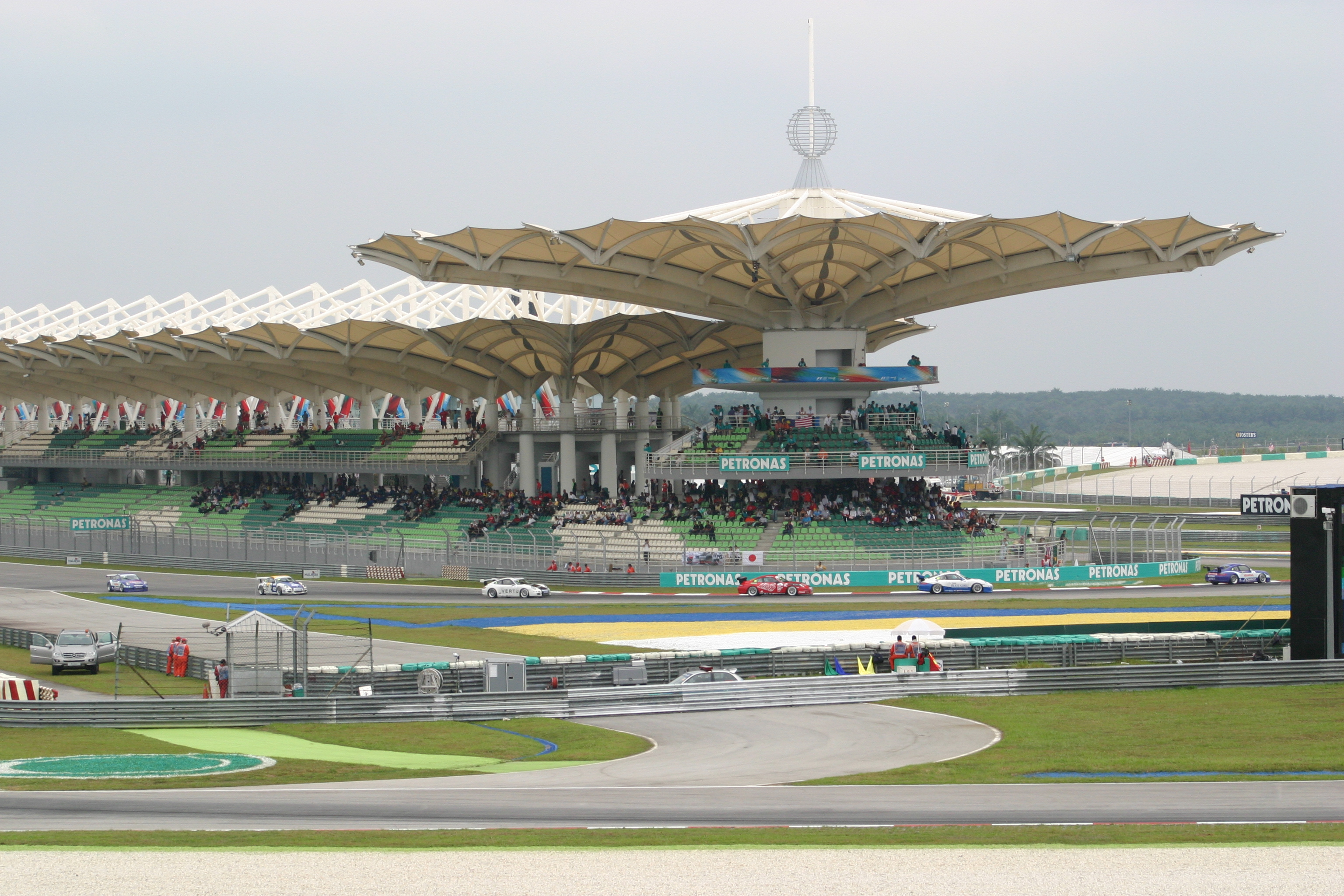 Вид на главную трибуну автодрома Сепанг